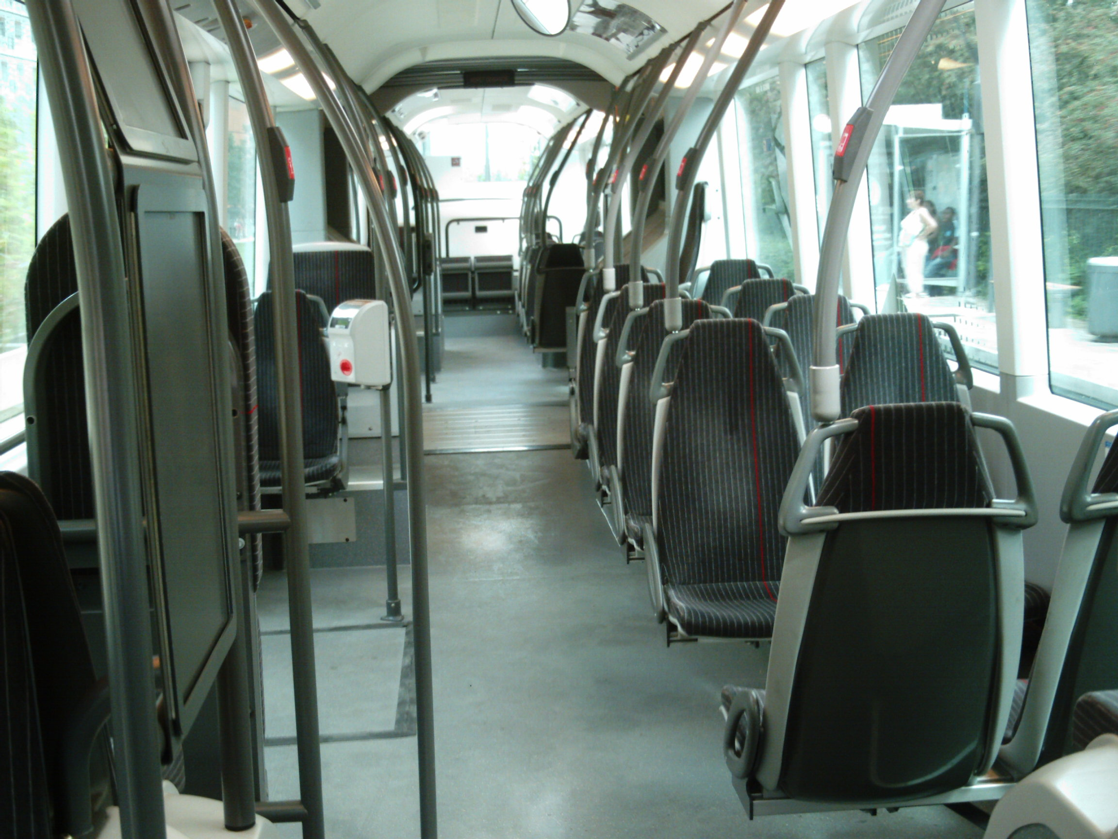 Intérieur d'un ETB18.